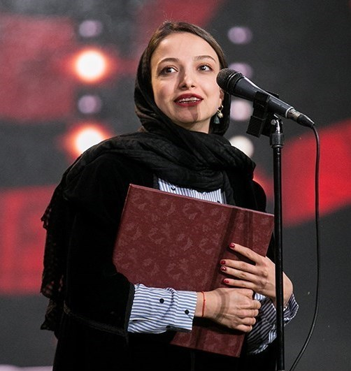 ندا جبرائیلی در اختتامیه سی‌وپنجمین جشنواره بین المللی فیلم کوتاه تهران